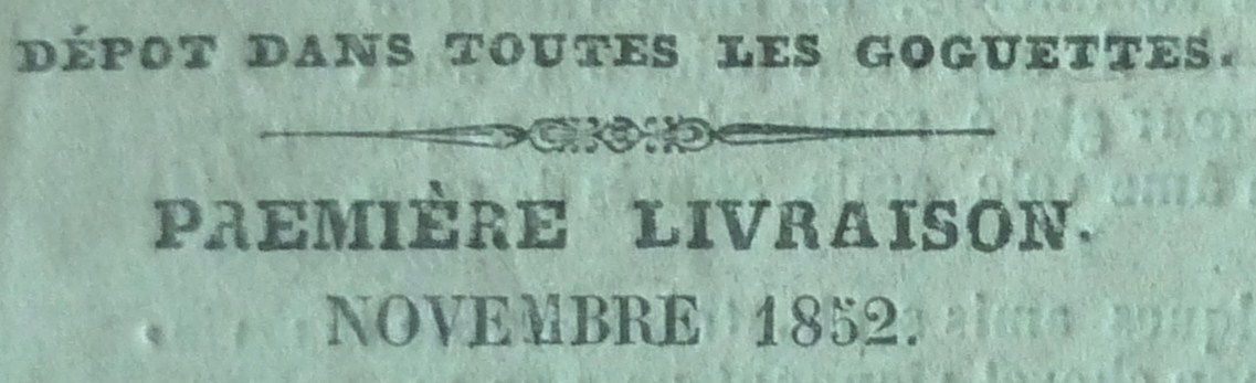 Précision en page de couverture de "L'Hirondelle lyrique, Écho des goguettes", publié par Clovis Poirée, Paris novembre 1852.